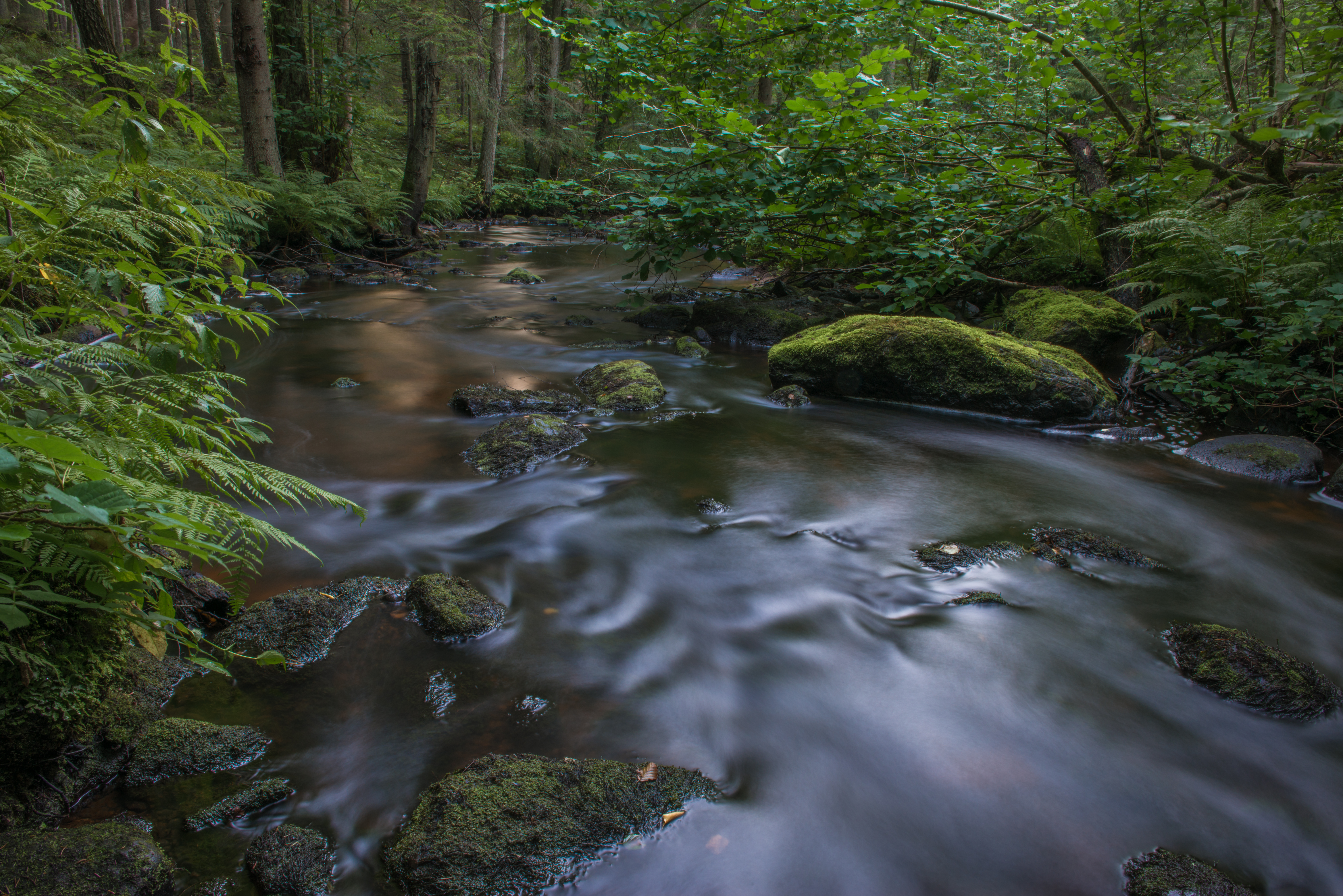 Pärlijõgi Lahemaa rahvuspargis